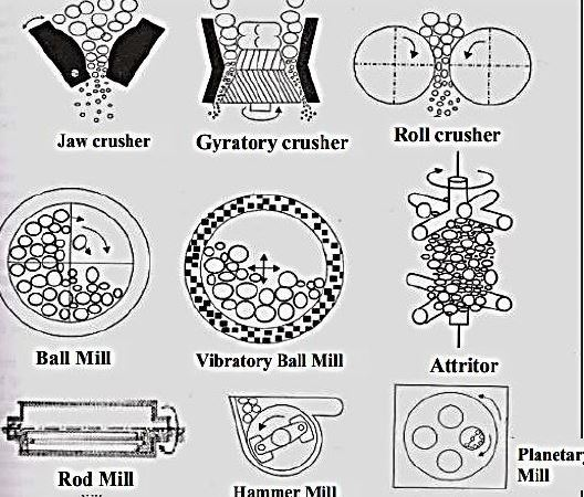 روش مکانیکی